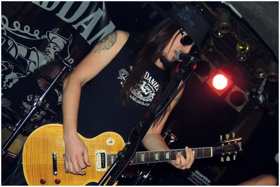 Tommy Wheeler (zpěvák, kytarista a skladatel)